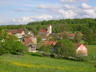 Village de Courtelevant (Territoire de Belfort) Photo prise en mai 2004 par LP90 Licence GFDL LP90 mai 2004